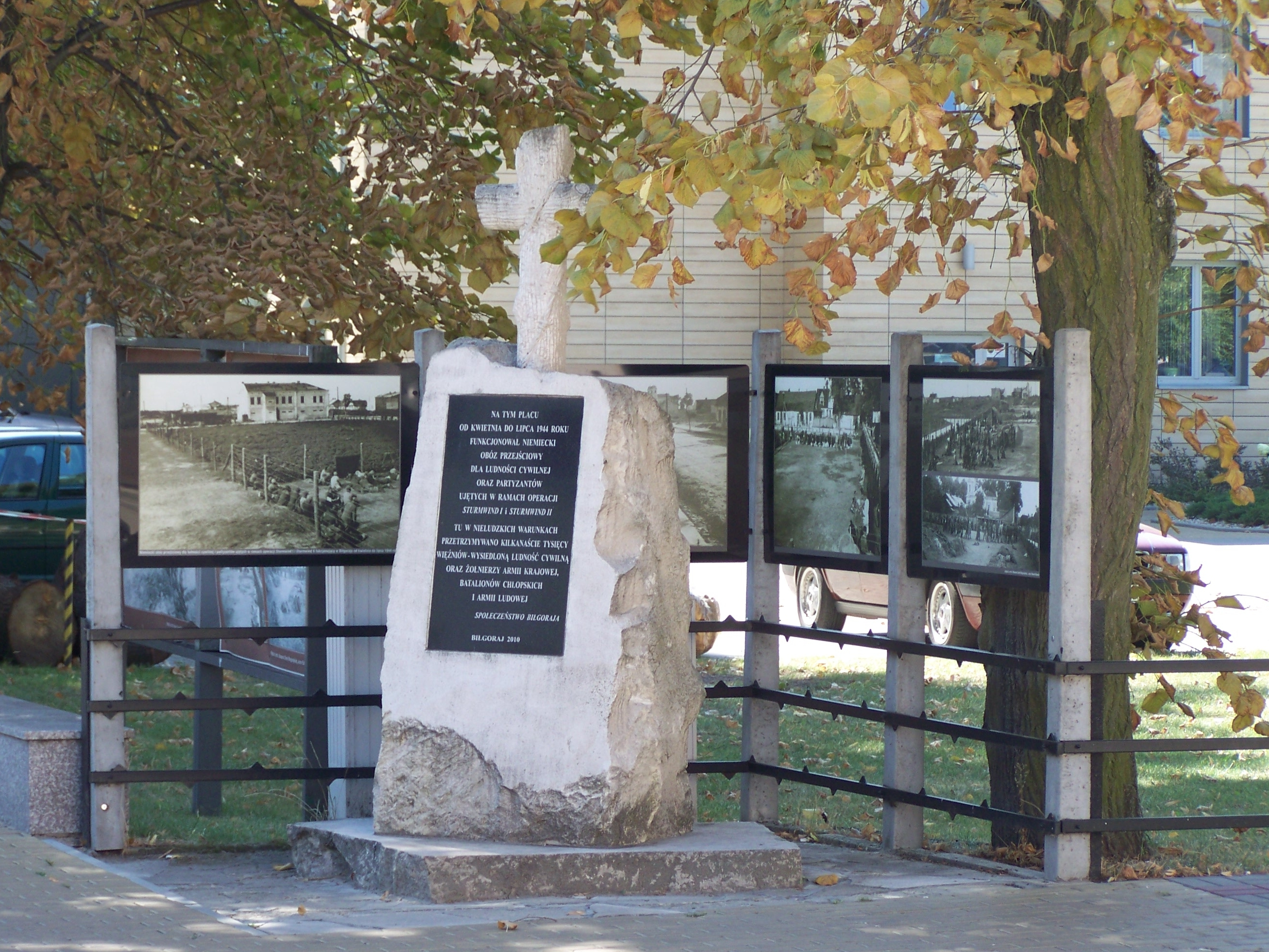 Obelisk upamiętniający miejsce, gdzie w latach okupacji niemieckiej funkcjonował hitlerowski obóz dla wysiedlanych mieszkańców Biłgorajszczyzny oraz partyzantów - jeńców wojennych.